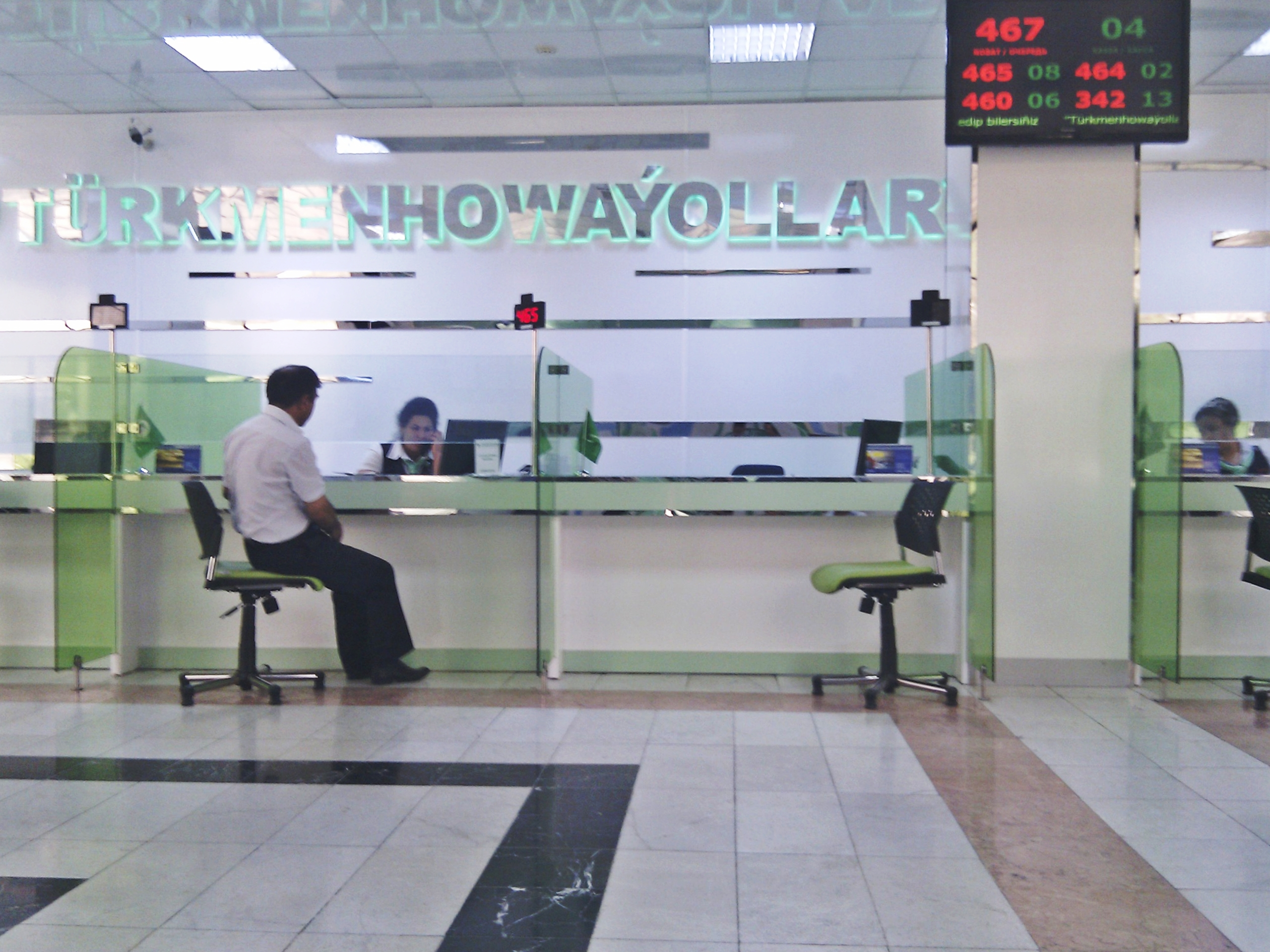 Касса авиакомпании Туркменские авиалинии в Ашхабаде